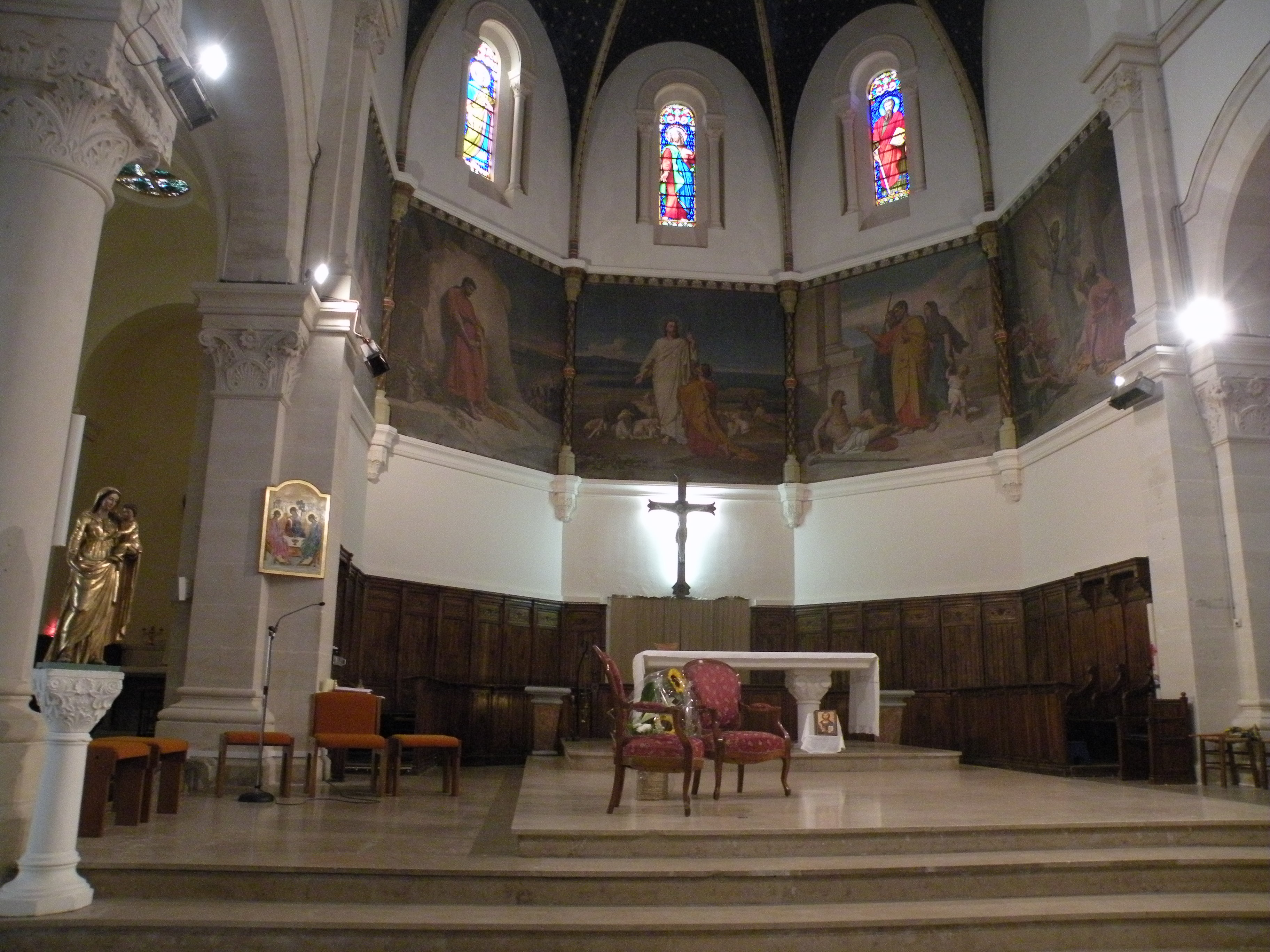 église Saint-Pierre de Marguerittes